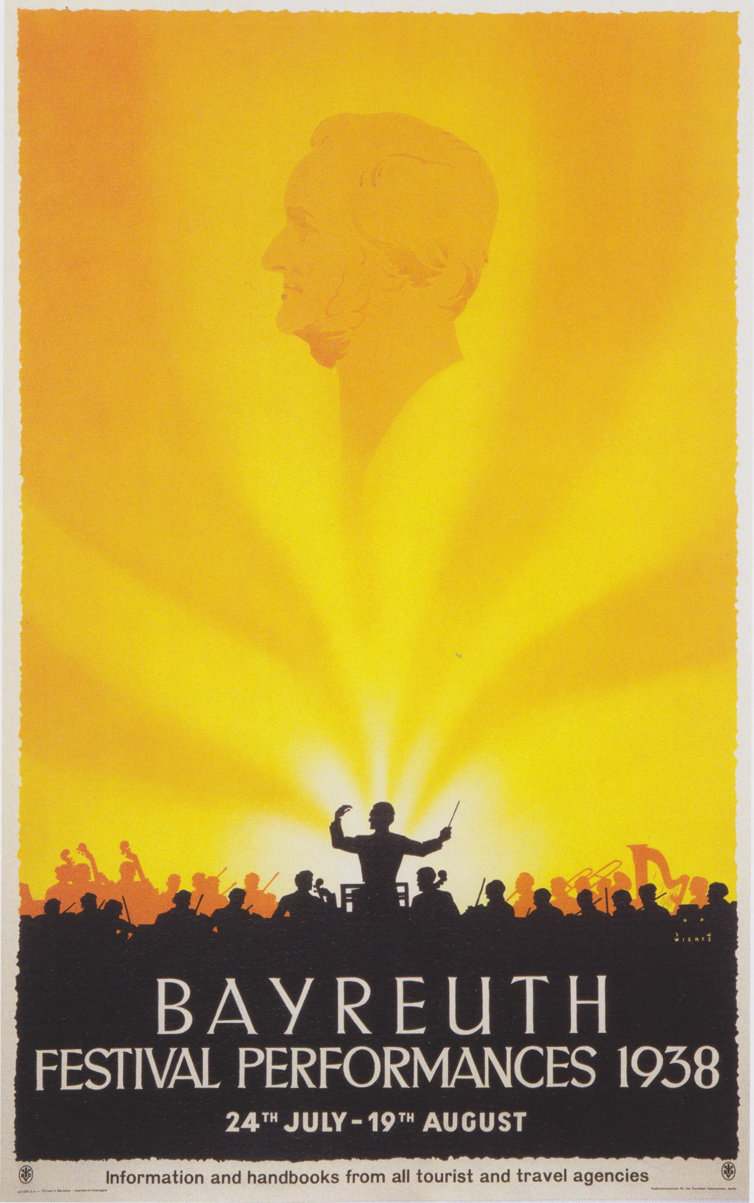 Plakat für die Bayreuther Festspiele 1938 von Jupp Wiertz (1888-1939)